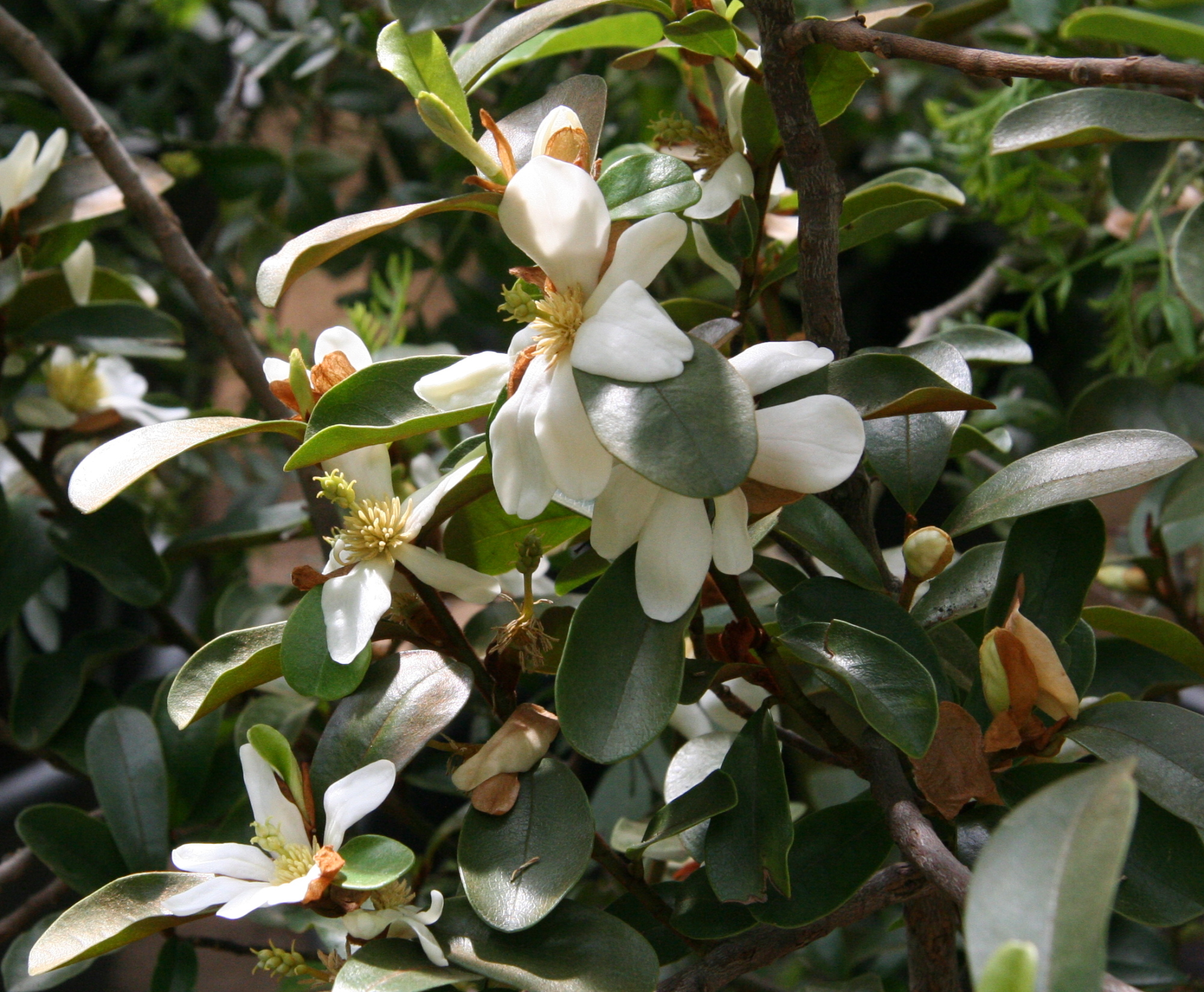 Magnolia laevifolia im Botanischen Garten Bayreuth